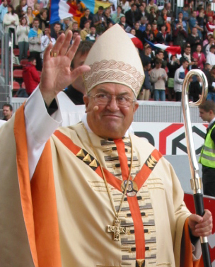 Karl Kardinal Lehmann 15. August 2005, Abschlussgottesdienst "Tage der Begegnung", Mainz (Bruchwegstadion)